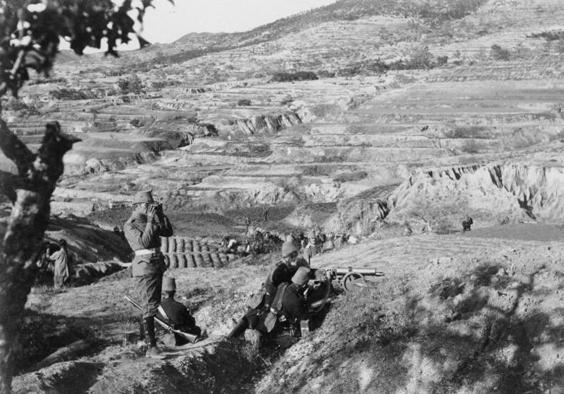 Schutzgebiet Kiautschou Bismarck-Berg Batterie (Kampf um Tsingtau, 1914)